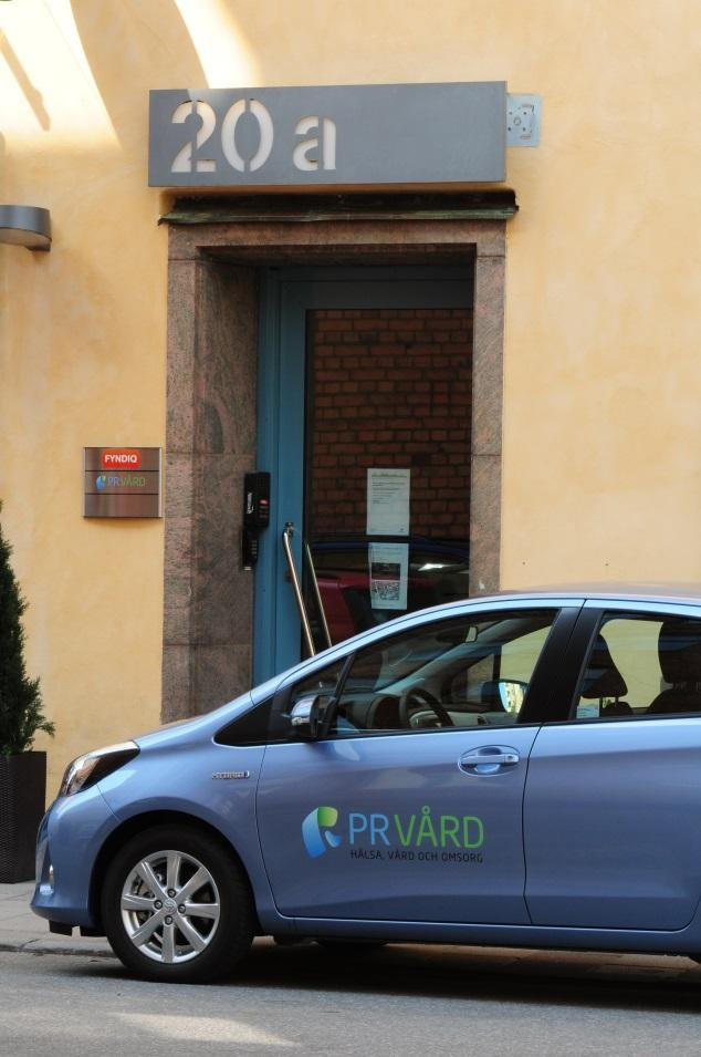 Huvudkontor PR Vård AB